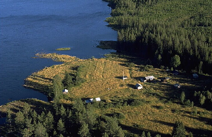 Vid Smedjemorasjön. Motiv: Strömvallen Nyckelord: Flygbilder, Riksintressen Kategori: Insjömiljöer, FäbodsmiljöVid Smedjemorasjön.